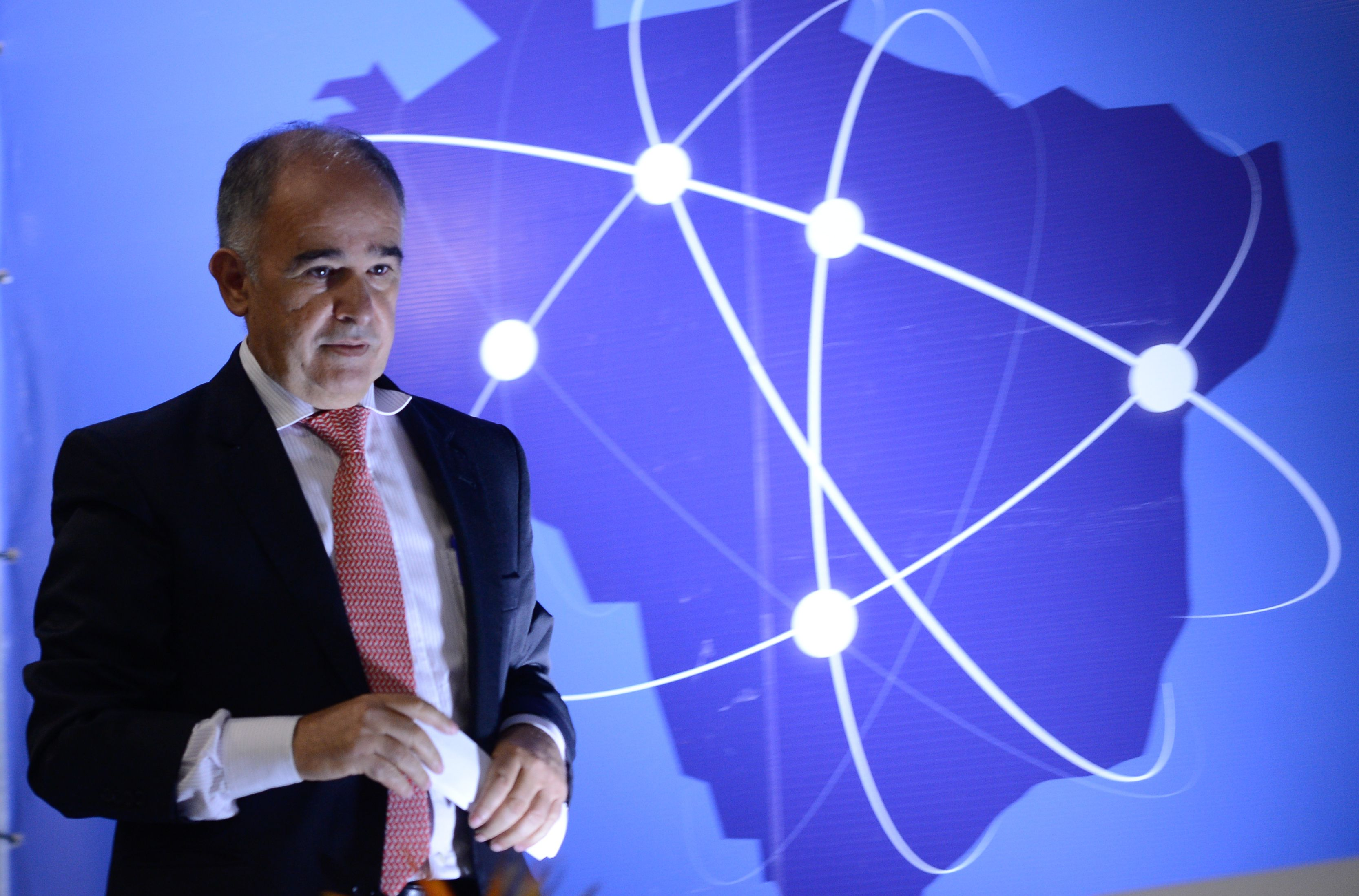 Brasília - O diretor-presidente da Agência Nacional de Águas (ANA), Vicente Andreu, participa do lançamento da Rede Nacional de Monitoramento de Qualidade das Águas (Marcelo Camargo/Agência Brasil)